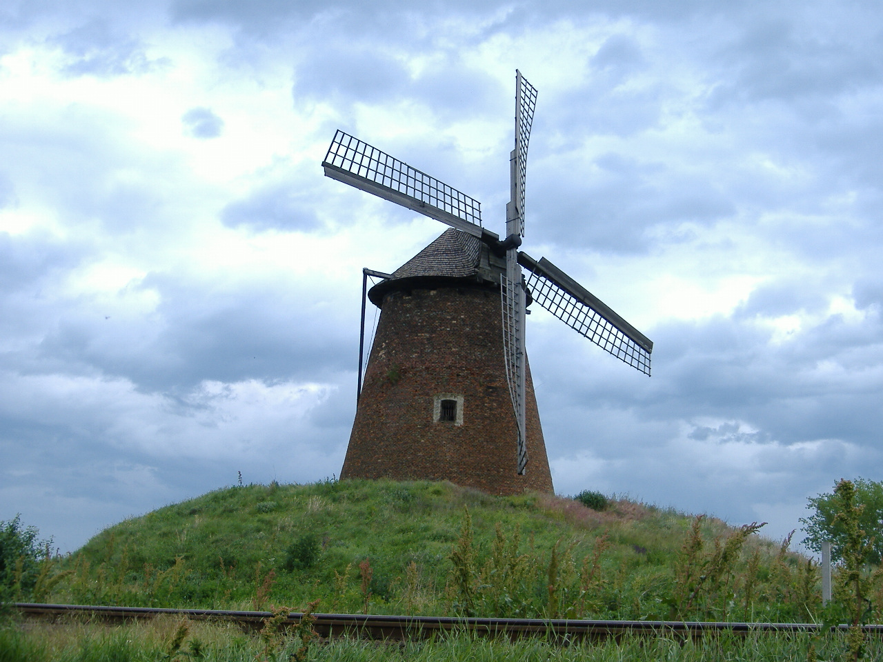 A kengyeli Szélmalom-domb This is a photo of a monument in Hungary, Identifier: 6010